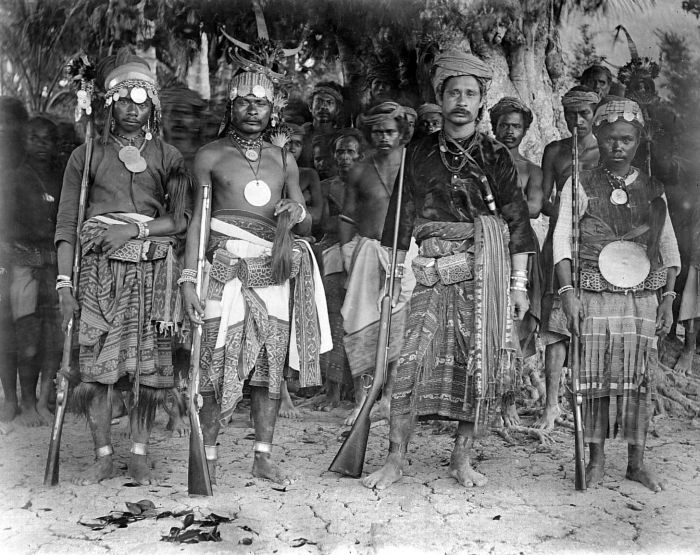 Negatief. De Radja van Amarasi met krijgers